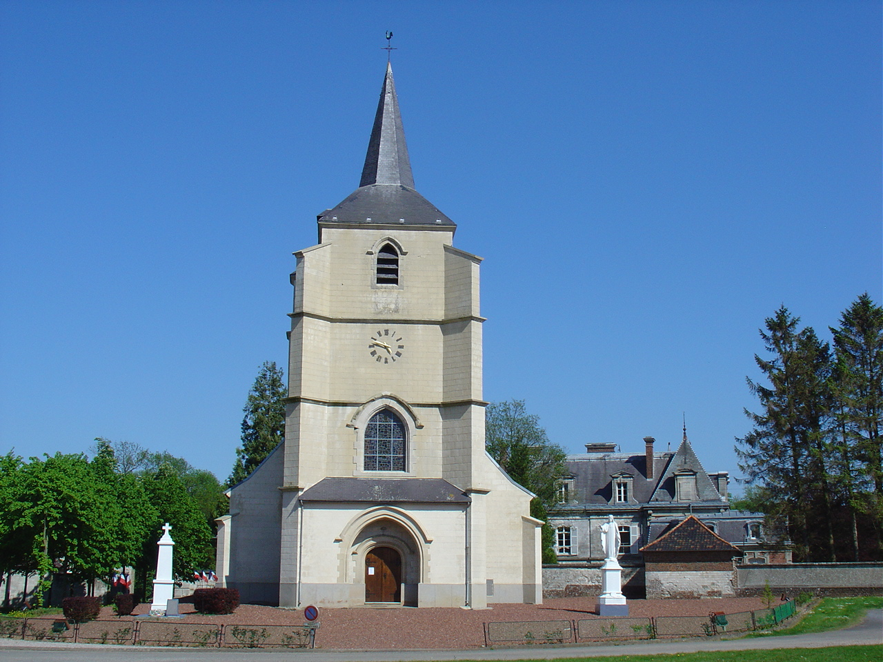 Église de Hautecloque